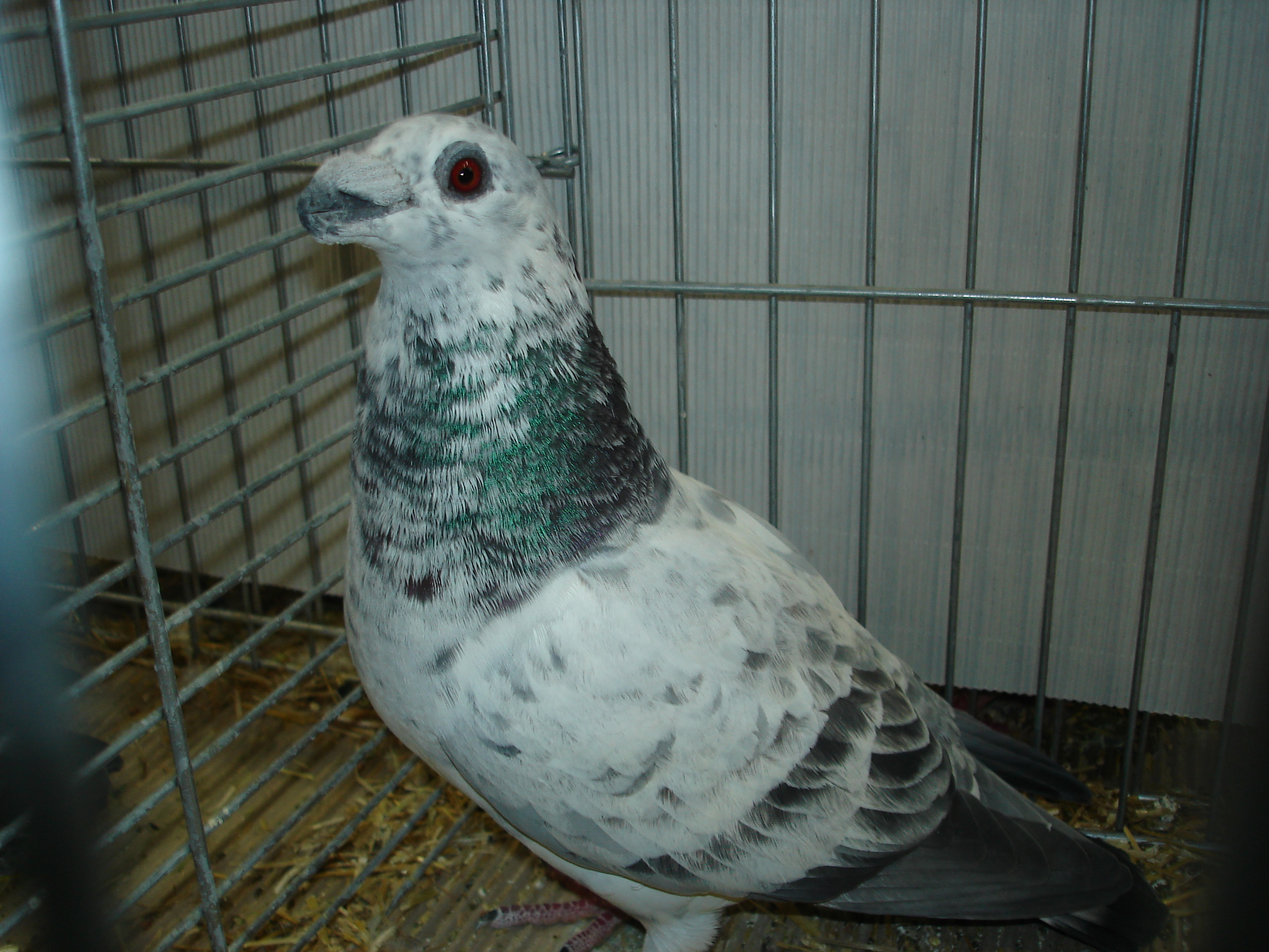 Zdjęcie gołębia, zwanego dragonem